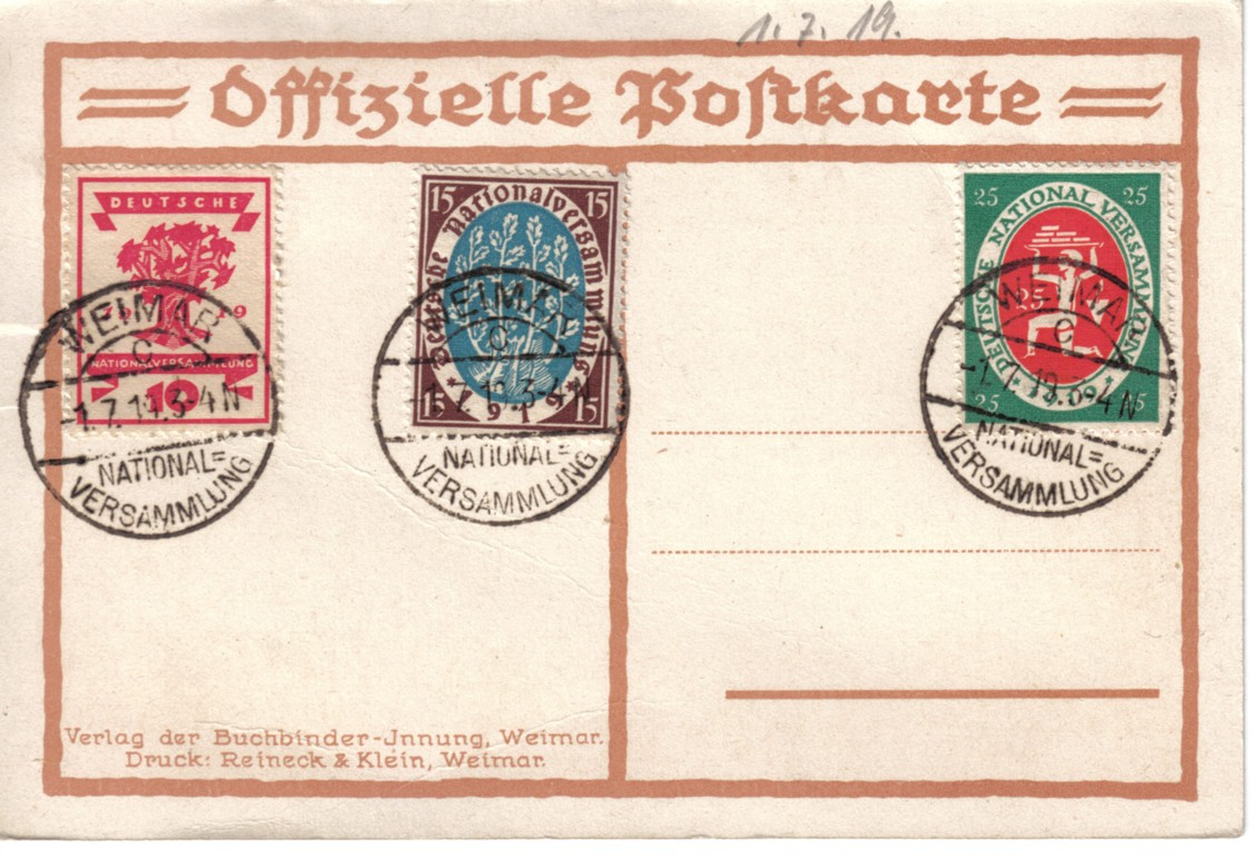 Drei Briefmarken der Deutschen Reichspost von 1919. Thema: Deutsche Nationalversammlung in Weimar 1919.